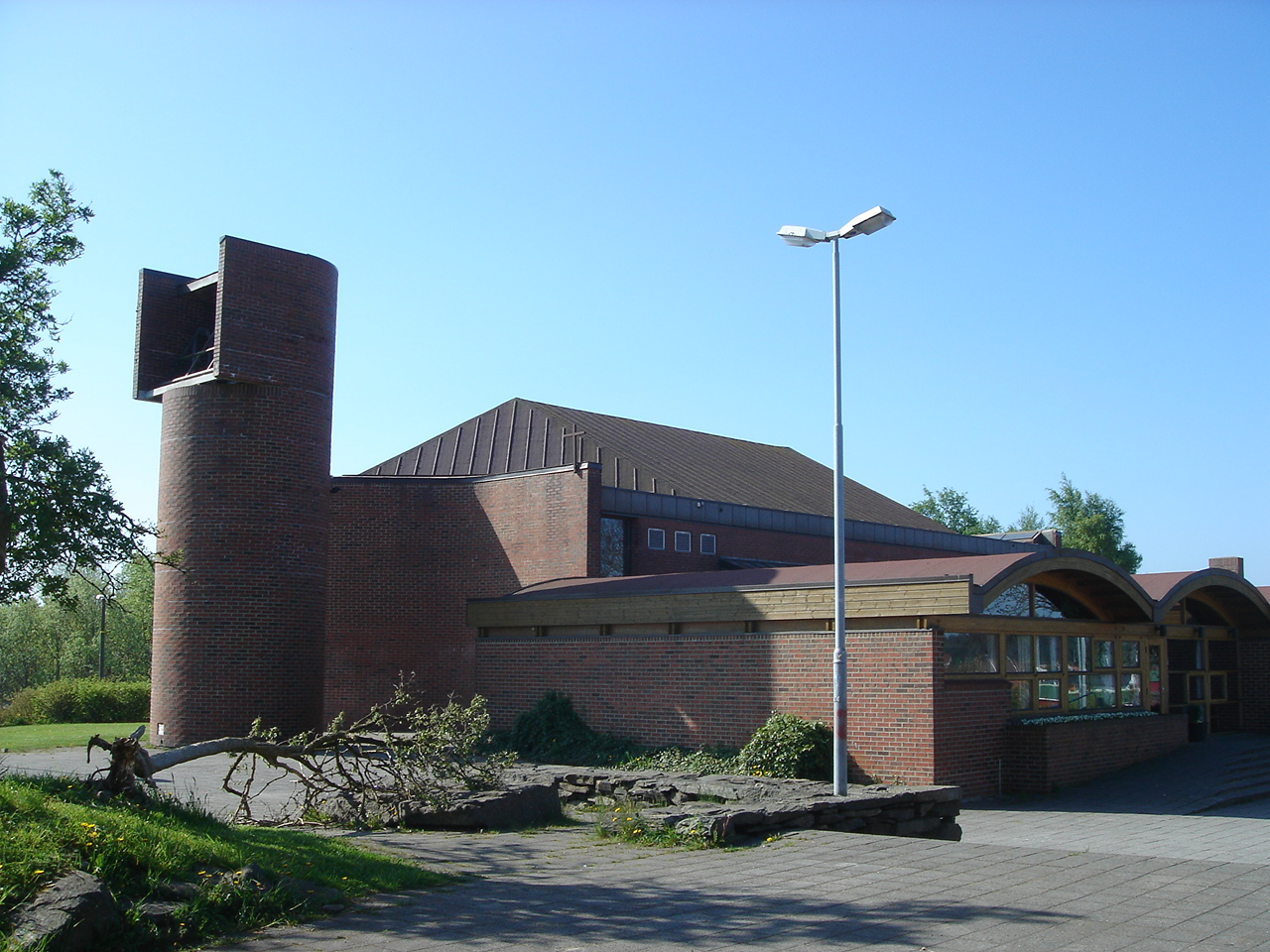 Hundvåg church in Stavanger, Norway